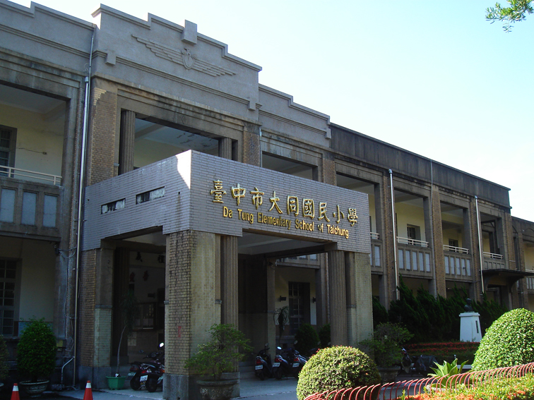 臺中市西區大同國民小學前棟大樓。